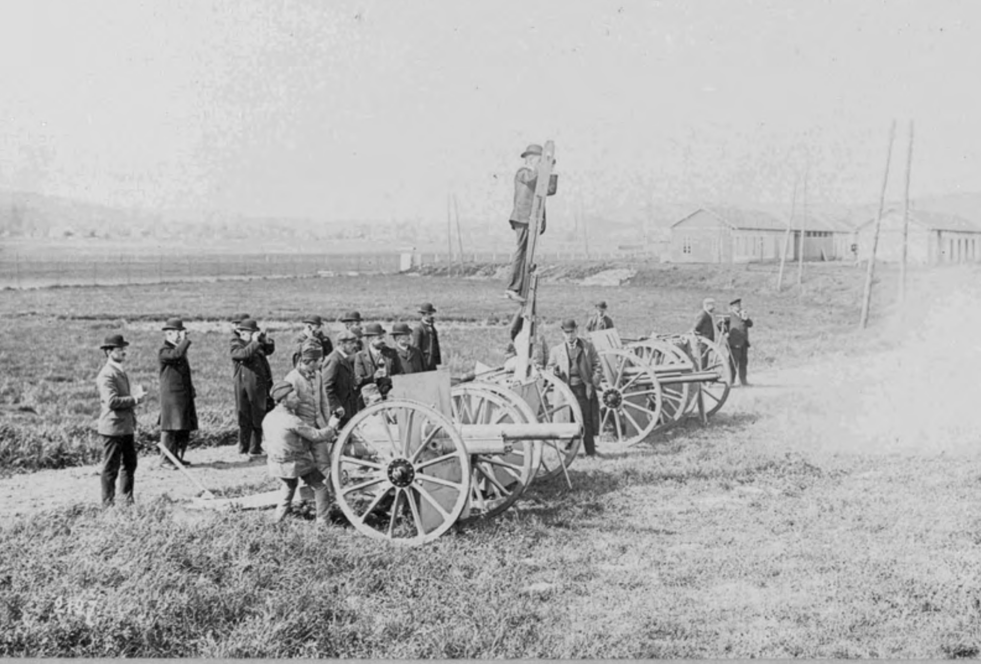 Pruebas de tiro llevadas a cabo en el polígono de tiro de Harfleur en presencia de la comisión española de jefes y oficiales de Artillería para probar las piezas de artillería Schneider-Canert en Mayo de 1904. Los piezas en esta imagen son el cañón de campaña de tiro rápido de 75 mm, en frente tirando a 2000 m, y el cañón de montaña de 75 mm, detrás. Se puede ver también a un integrante de la comisión subido al observatorio montado en el armón de la pieza de campaña.